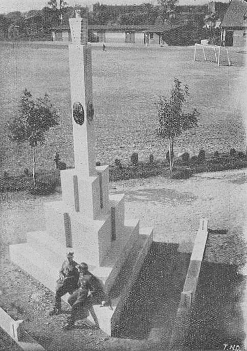 Pomnik Józefa Piłsudskiego (na ukończeniu budowy) w Centrum Wyszkolenia Żandarmerii (1931)